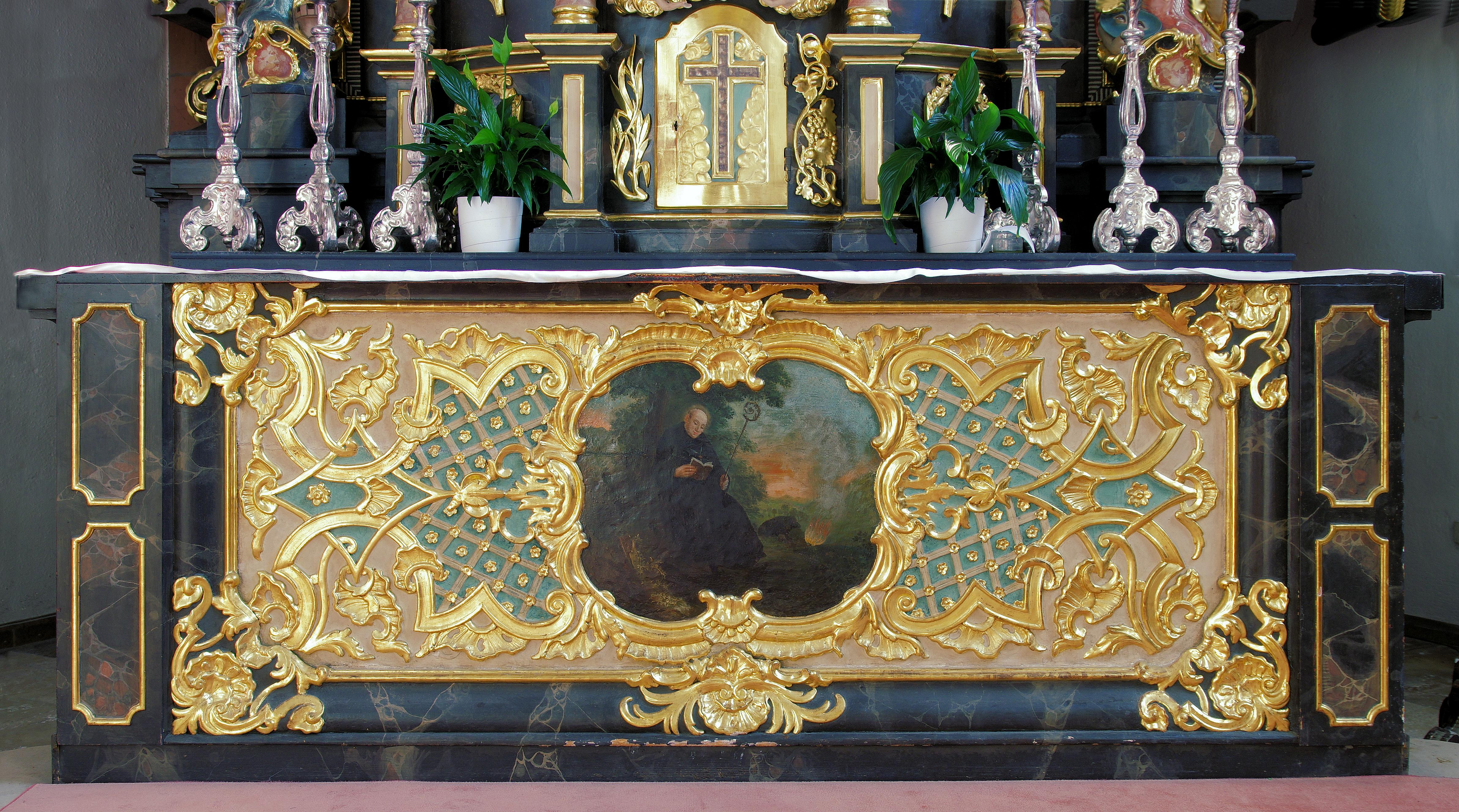 Das Antependium des Hauptaltars mit einem Bild von St. Gallus